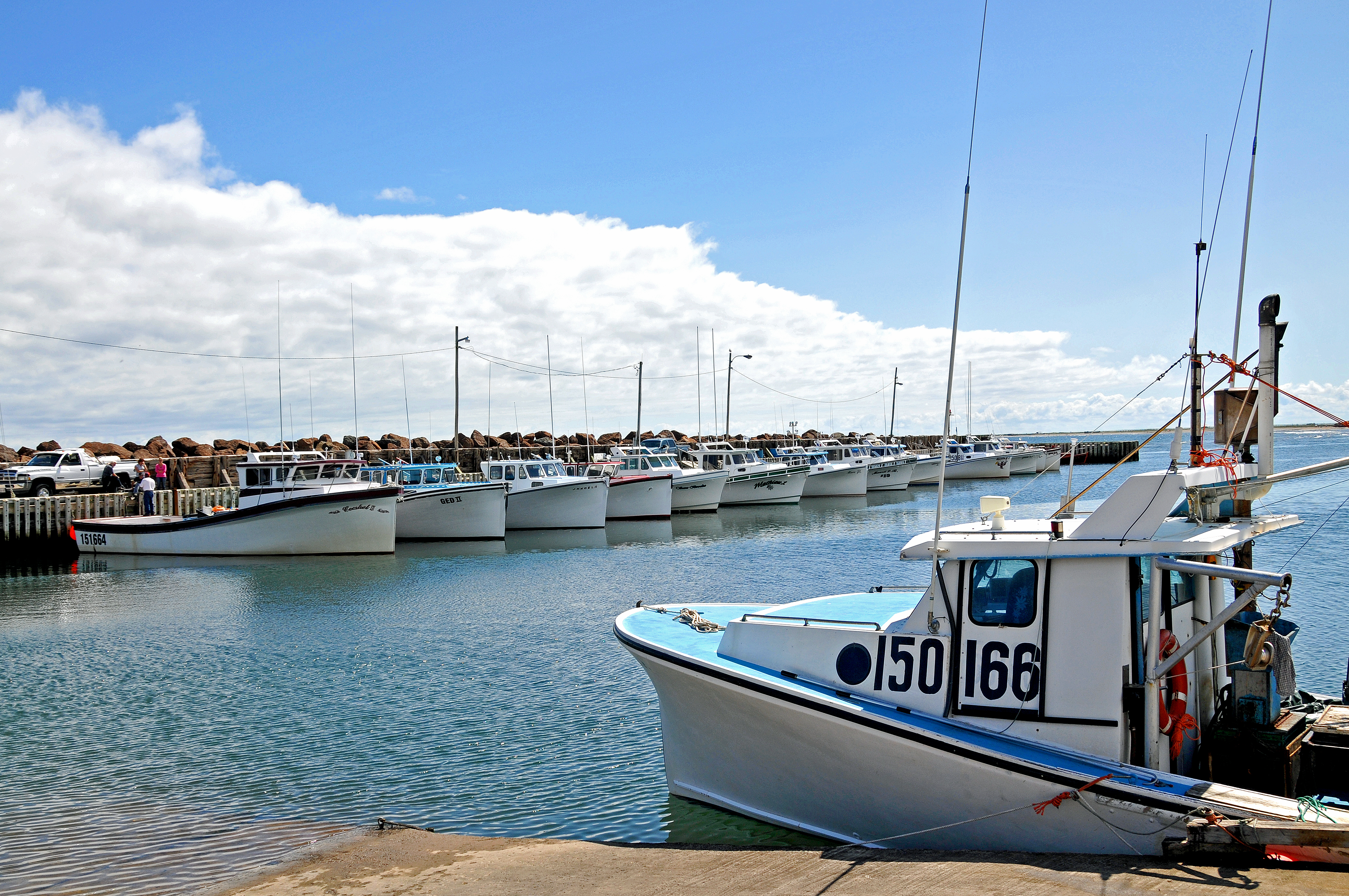 Le port de Saint-Édouard-de-Kent, au Nouveau-Brunswick (Canada).Unknown the port of saint-édouard-de-kent in new brunswick, canada.